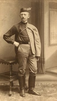 Jan Auerhan (1880 - 1942), Český právník.